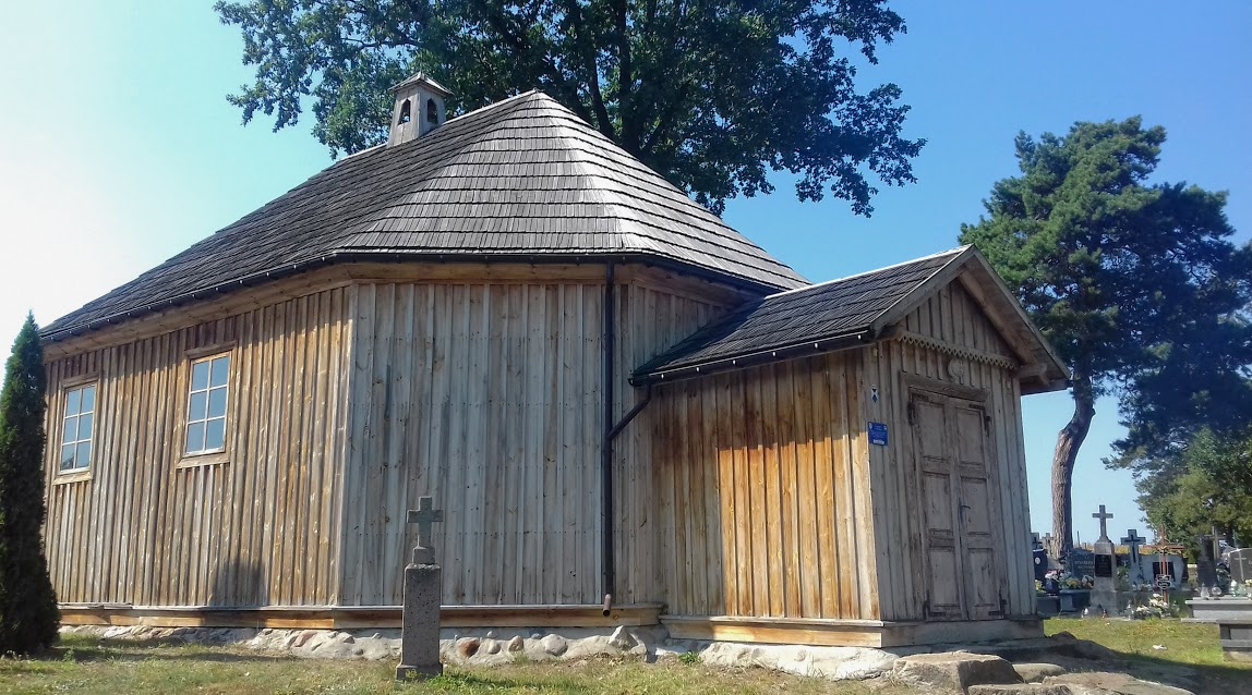 Kaplica cmentarna św. Anny na cmentarzu w Dziadkowicach, z 1826 fundacji dziedzica wsi Uszyńskiego, sędziego powiatu drohickiego, nr rej.:A-43 z 18.11.1966